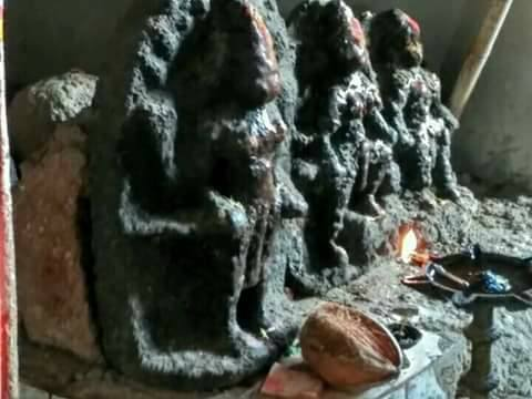 ग्रामदैवत,कुलदैवत